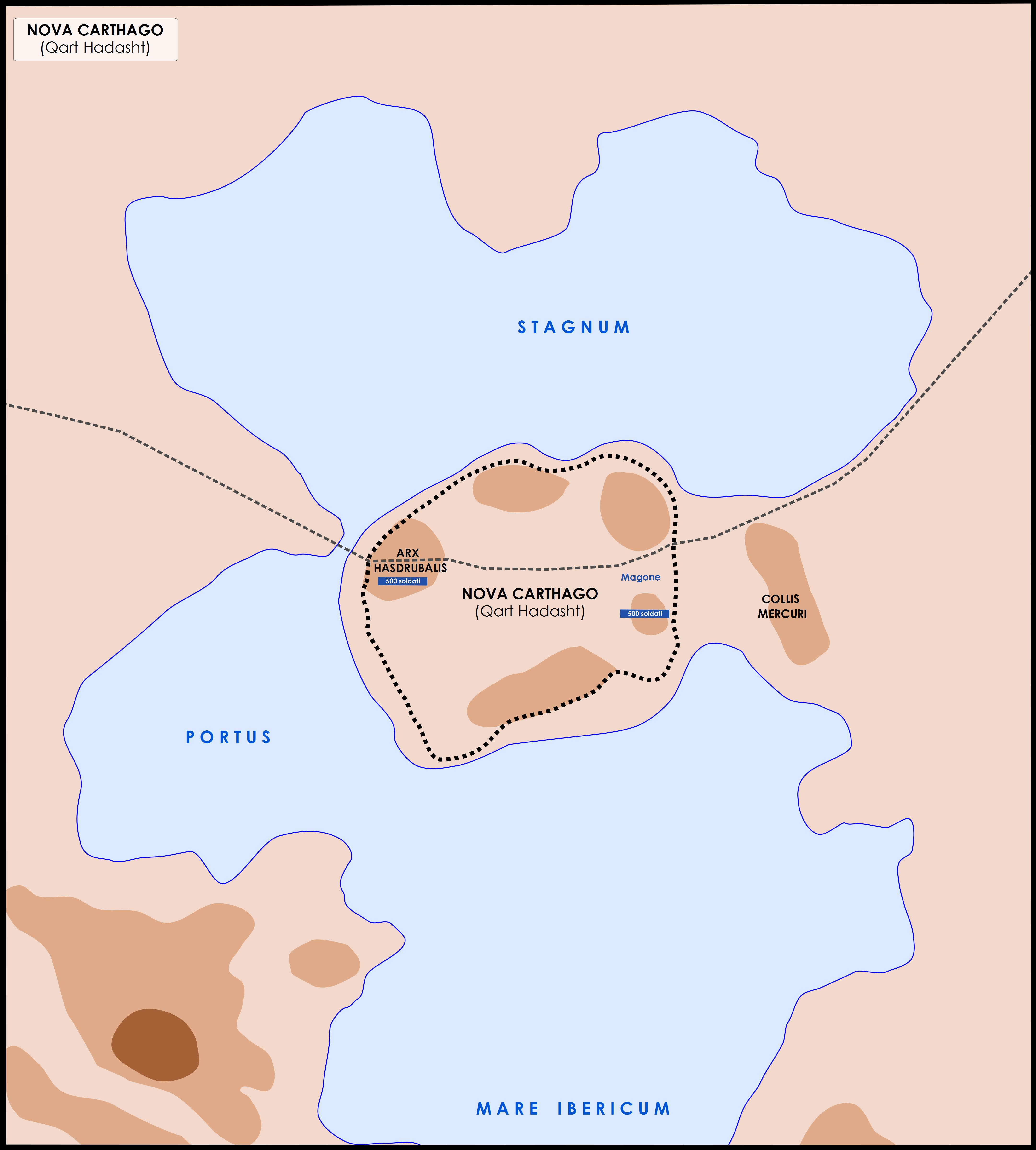 La città antica cartaginese in Spagna di Qart Hadasht. Chiamata in seguito dai Romani Nova Carthago